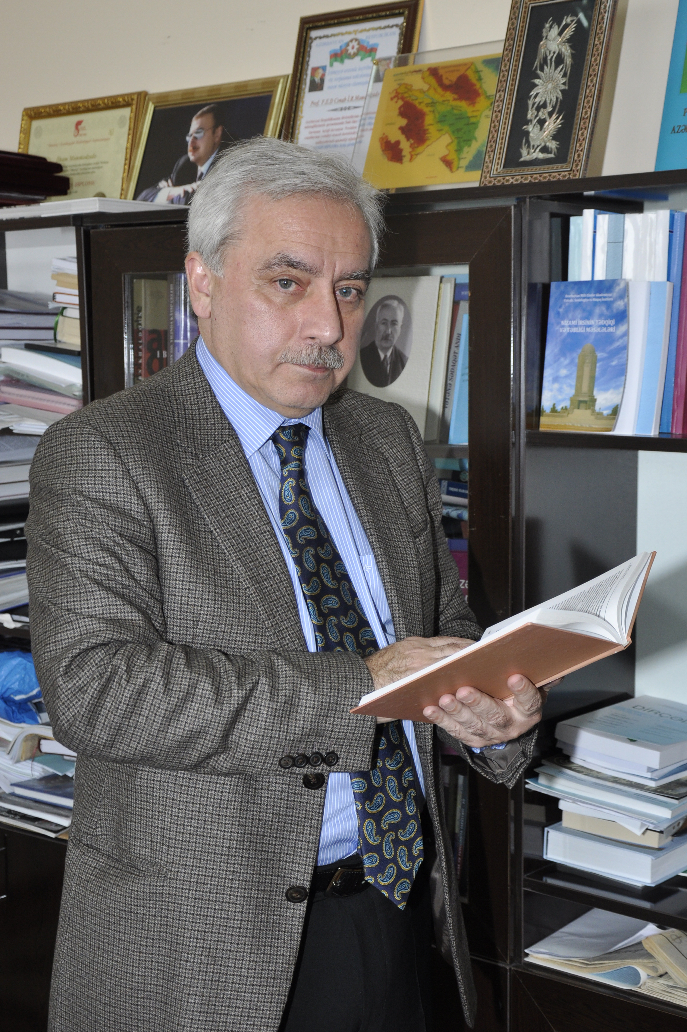 Доктор философских наук, профессор, директор Института Философии и права.